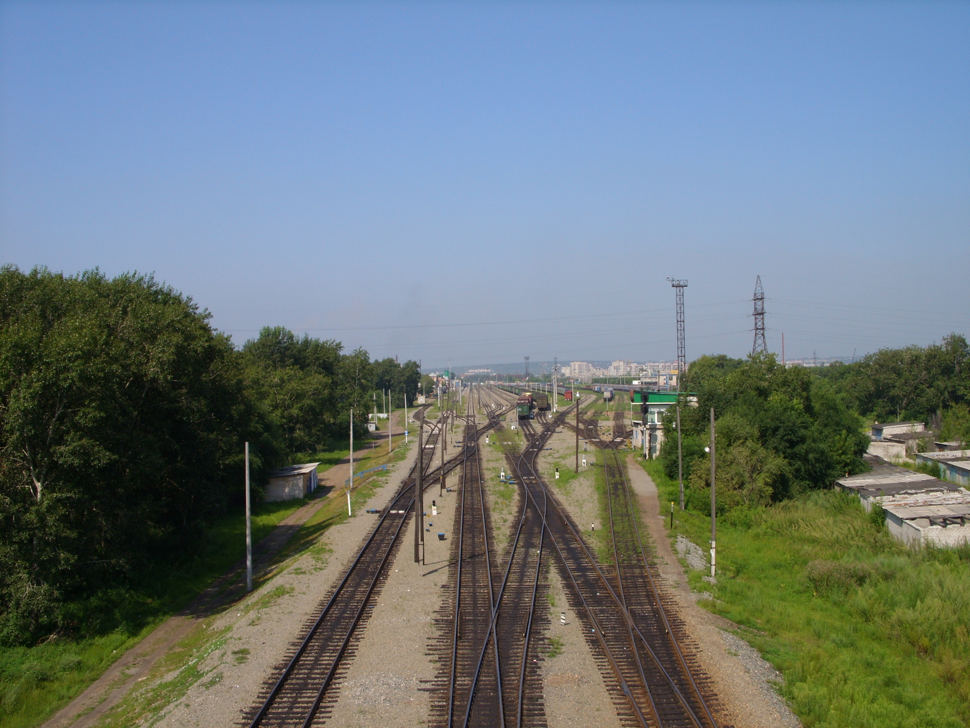 Россия, Амурская область, г. Благовещенск. Вид на станцию Благовещенск с автомобильного путепровода на Театральной улице. Снимок августа 2011 г.